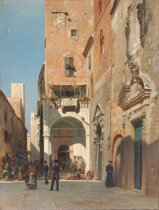 Domplatz in Albenga (Riviera), 1899, Öl auf Leinwand, 72 x 54 cm